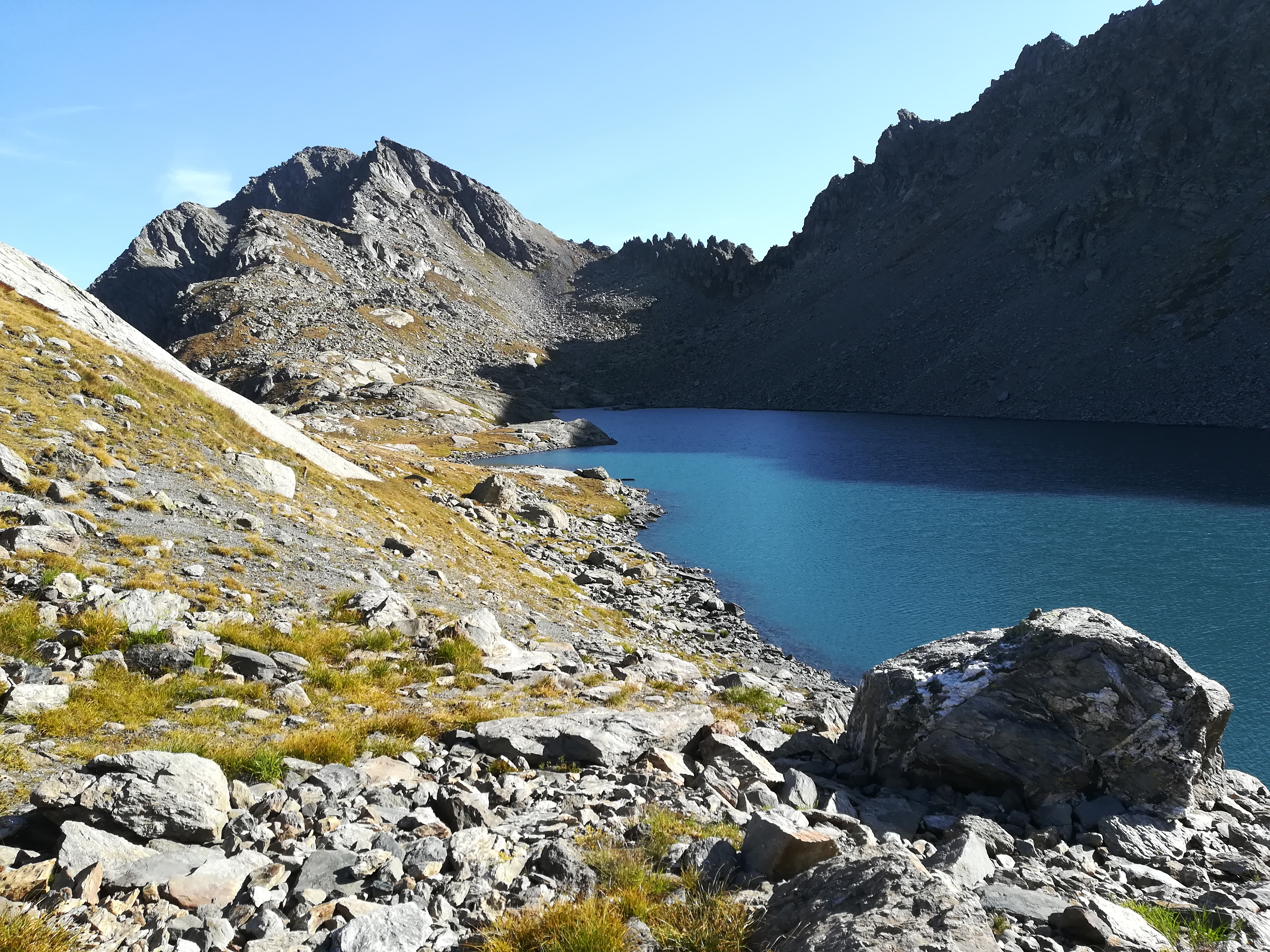 Il lago di Pietra Rossa incastonato tra pareti rocciose. Sullo sfondo la Becca Pouignenta